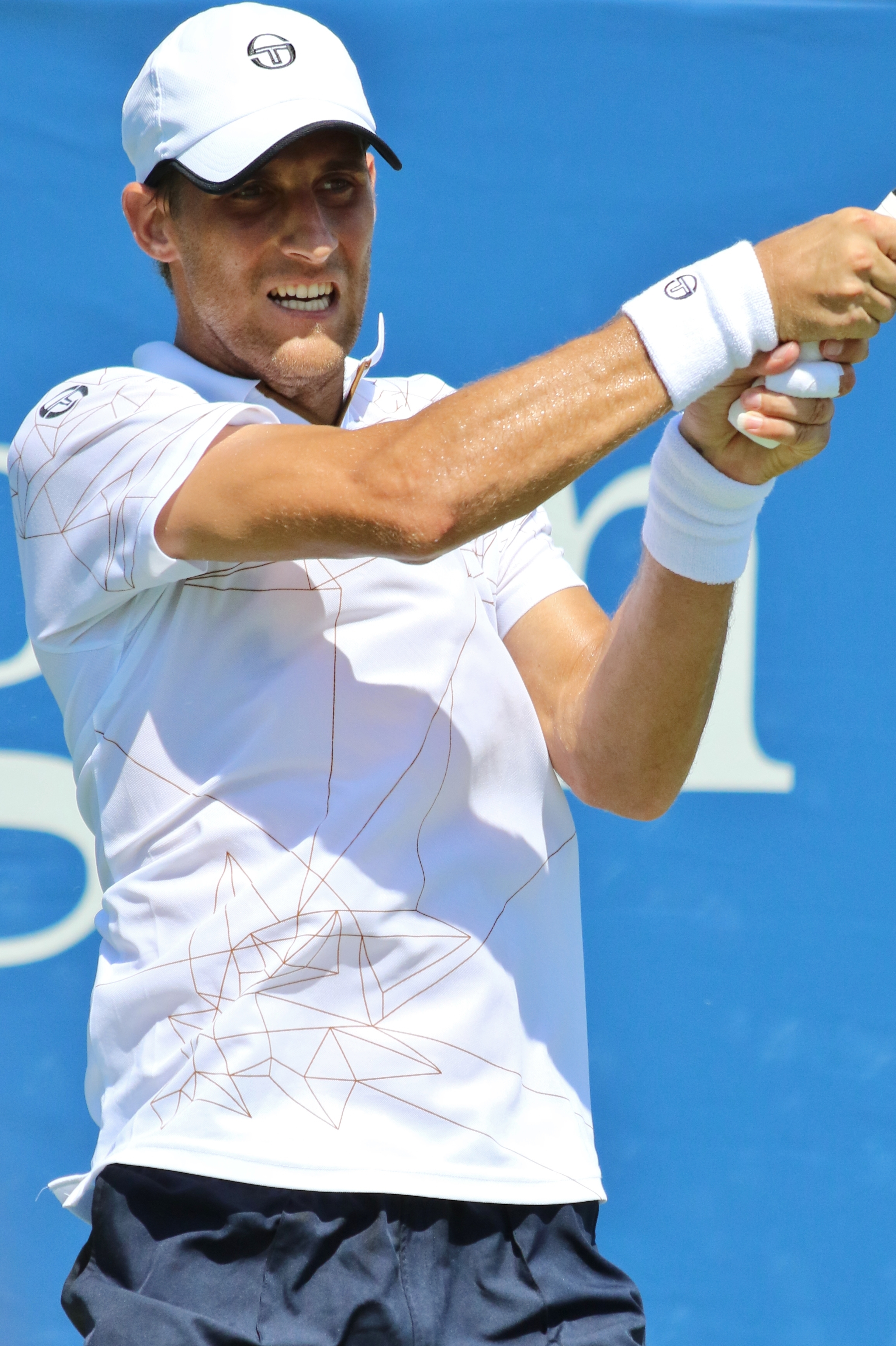 Klizan US16 (16)